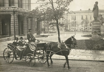 Henrik Ibsen foran Nationaltheatret. Ibsen hadde den ære å se seg selv på sokkel, etter at statuen av han fremfor Nationaltheatret ble satt opp i 1899.